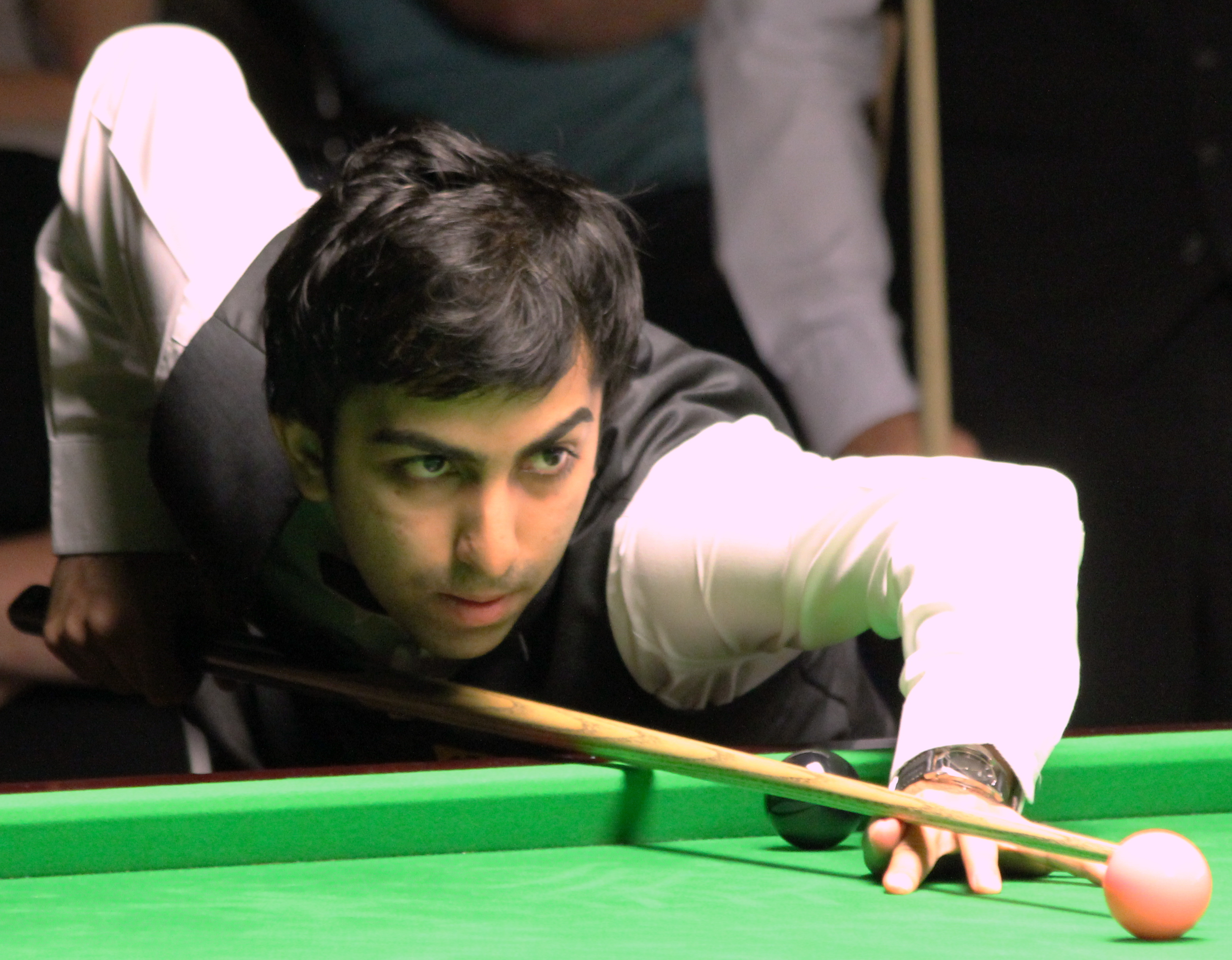 Pankaj Advani beim Paul Hunter Classic 2012